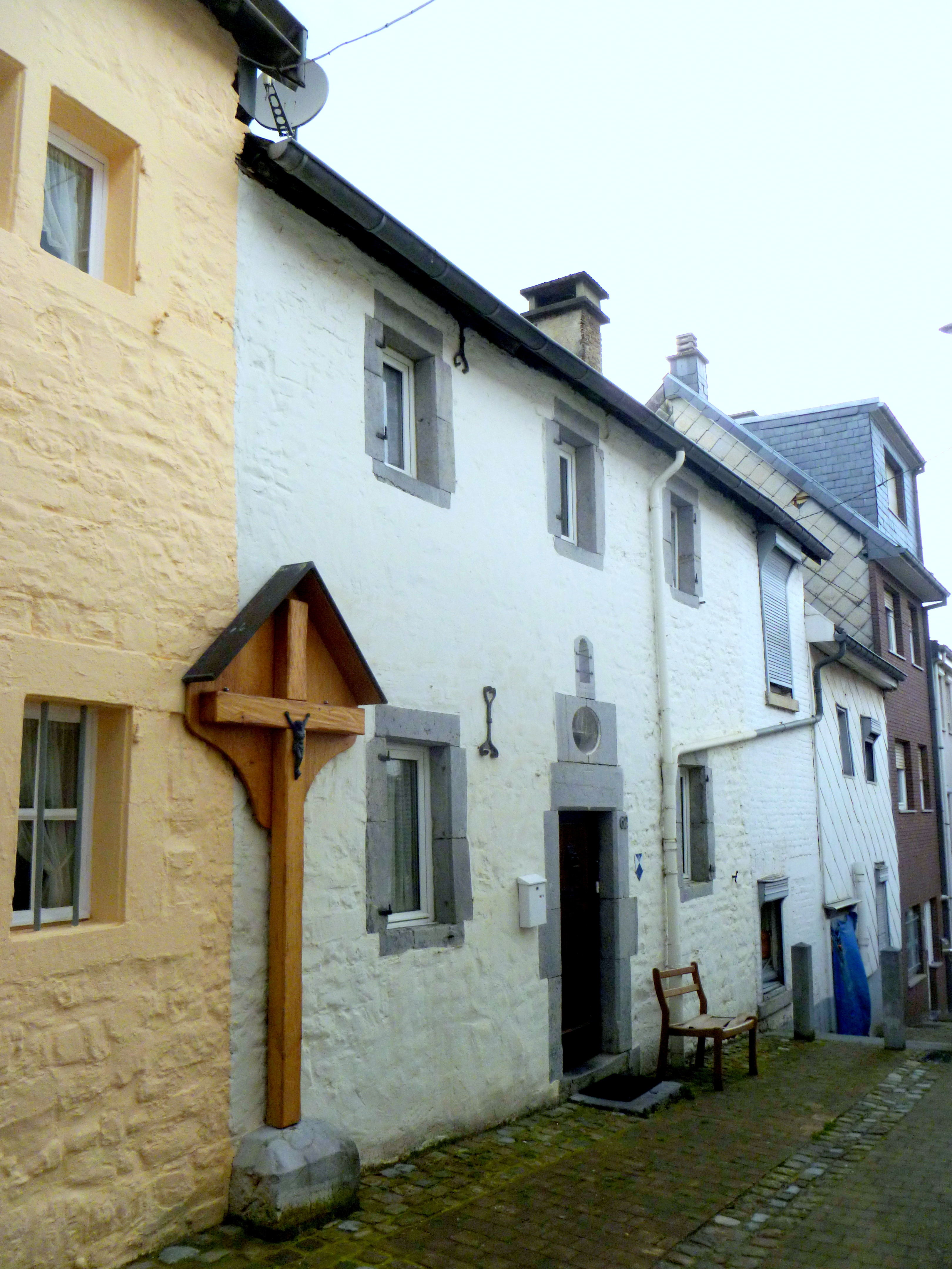 Baudenkmal Bergstraße 62 in Eupen